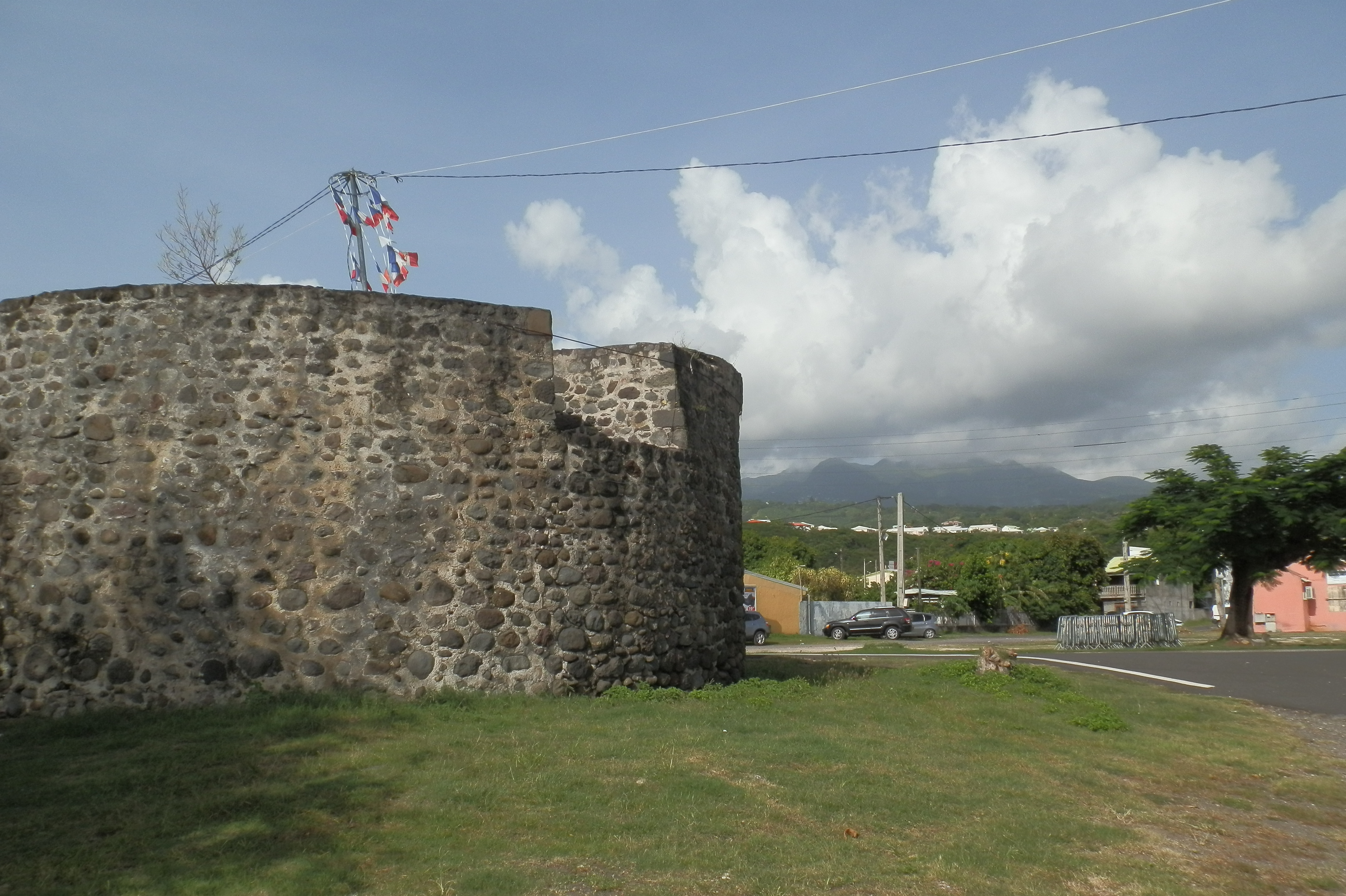 Tour du Père-Labat, (Inscrit, 1979) .